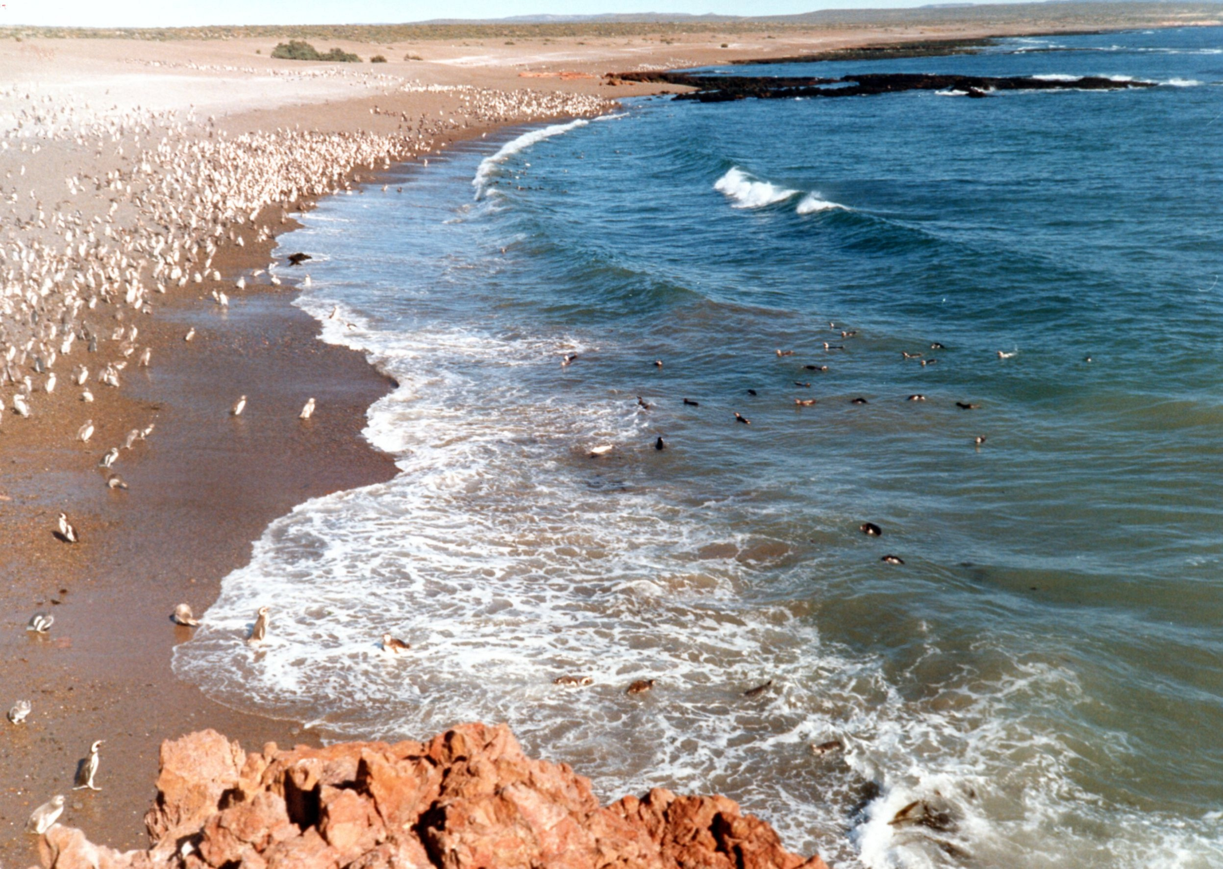 La Pingüinera Punta Tombo (prov. de Chubut) se encuentra situada a 180 km al sur de la ciudad de Puerto Madryn. Es la mayor pingüinera continental; en primavera-verano llega a albergar hasta 700.000 pingüinos, que arriban a ese lugar para aparearse.